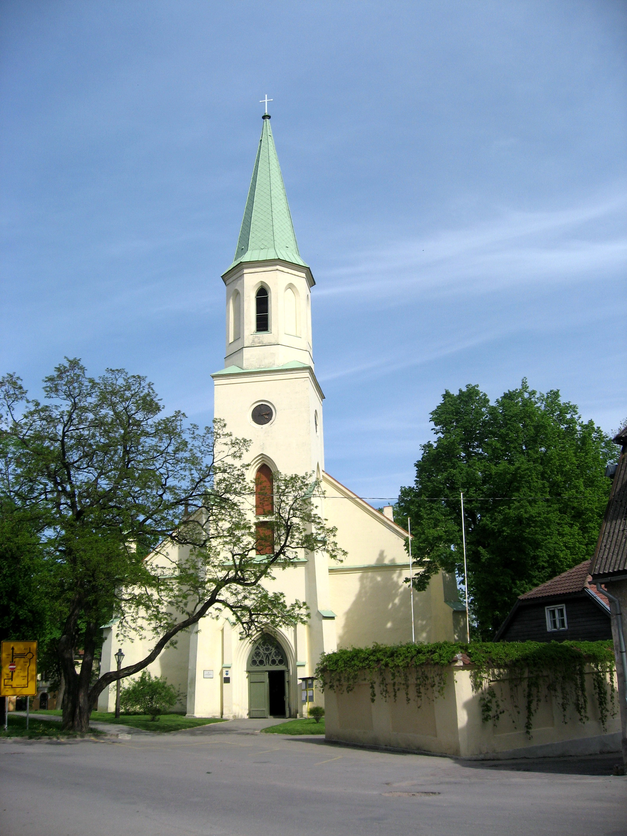 Kuldīga, luteránský kostel svaté Kateříny